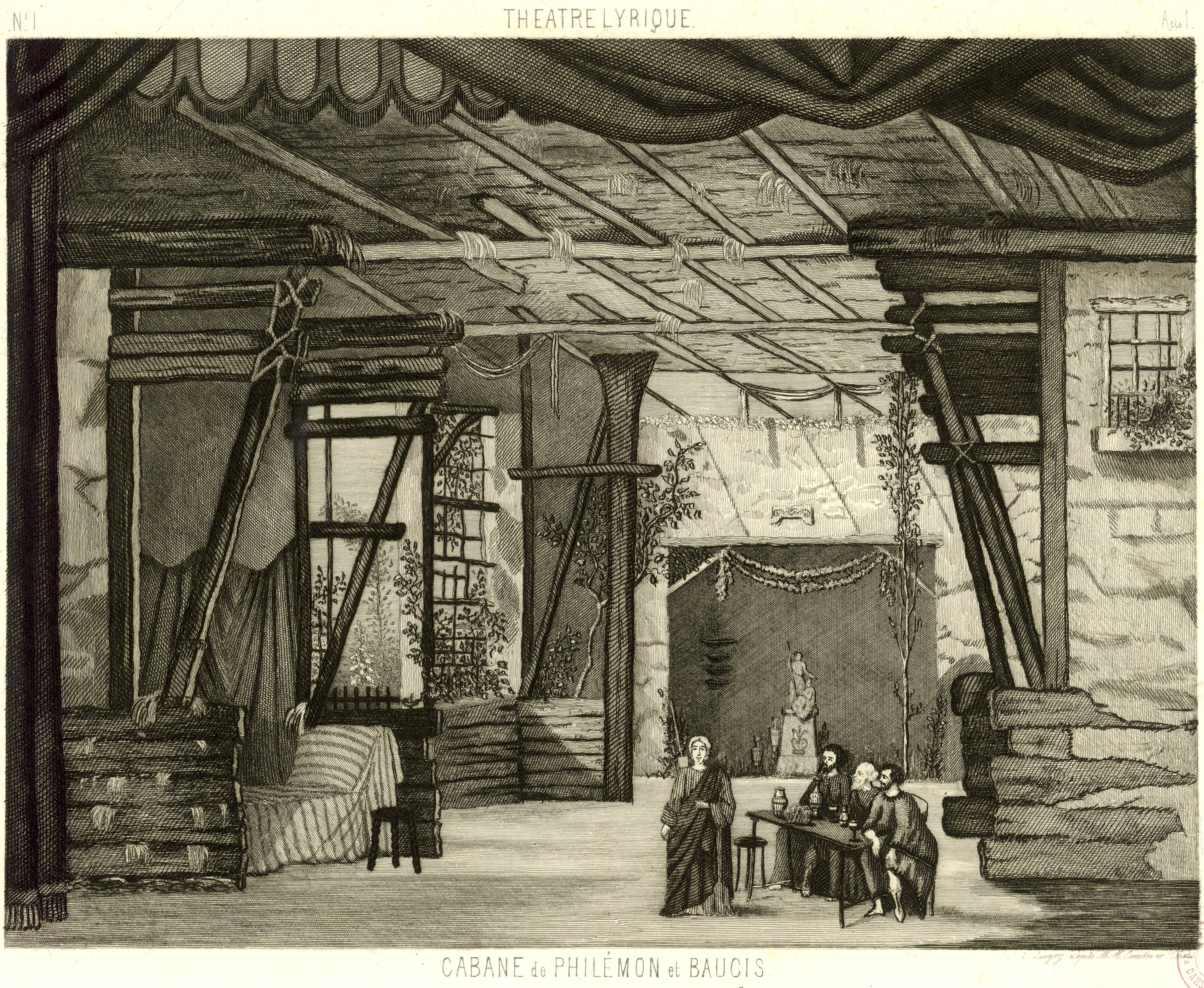 Philémon et Baucis : opéra-comique en 3 actes / musique de Charles Gounod. - Paris : Théâtre Lyrique, 18-02-1860. Jaugey, L. (18..-18.. ; dessinateur). Dessinateur du modèle. Graveur Author : Cambon, Charles-Antoine (1802-1875). Peintre du modèle Author : Thierry, Joseph (1812-1866). Peintre du modèle